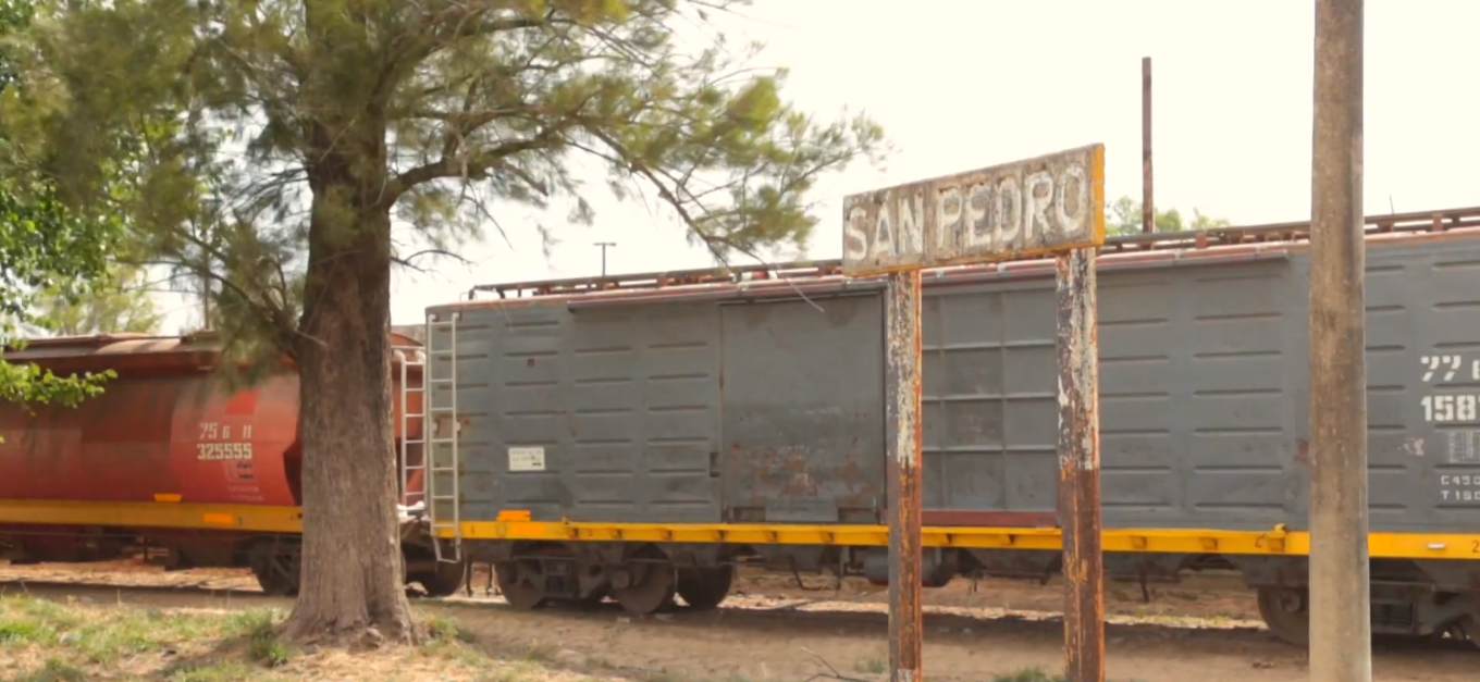 Estación San Pedro, San Pedro de Guasayán.